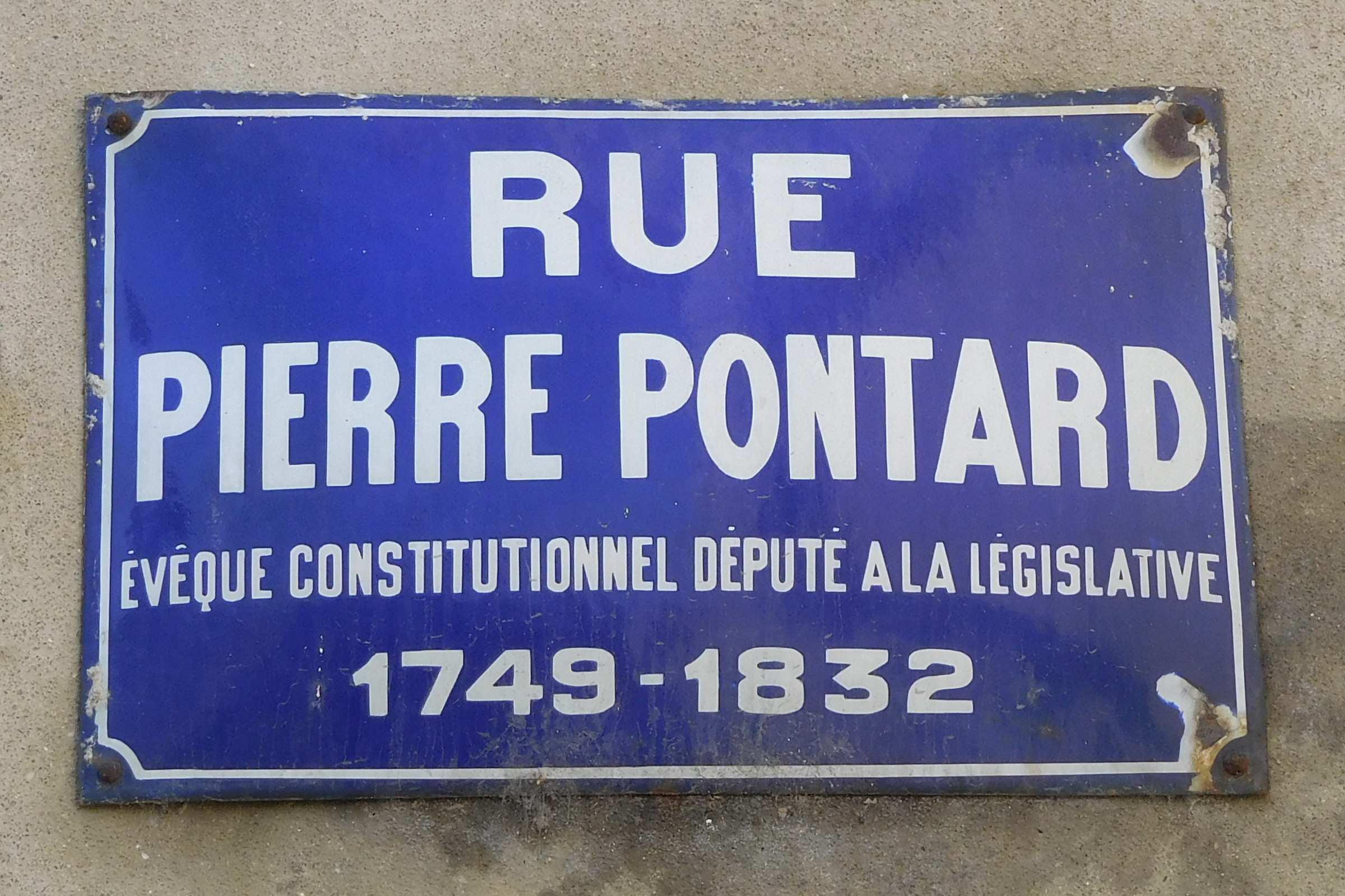 Plaque de rue en mémoire de Pierre Pontard ; Mussidan, Dordogne, France.